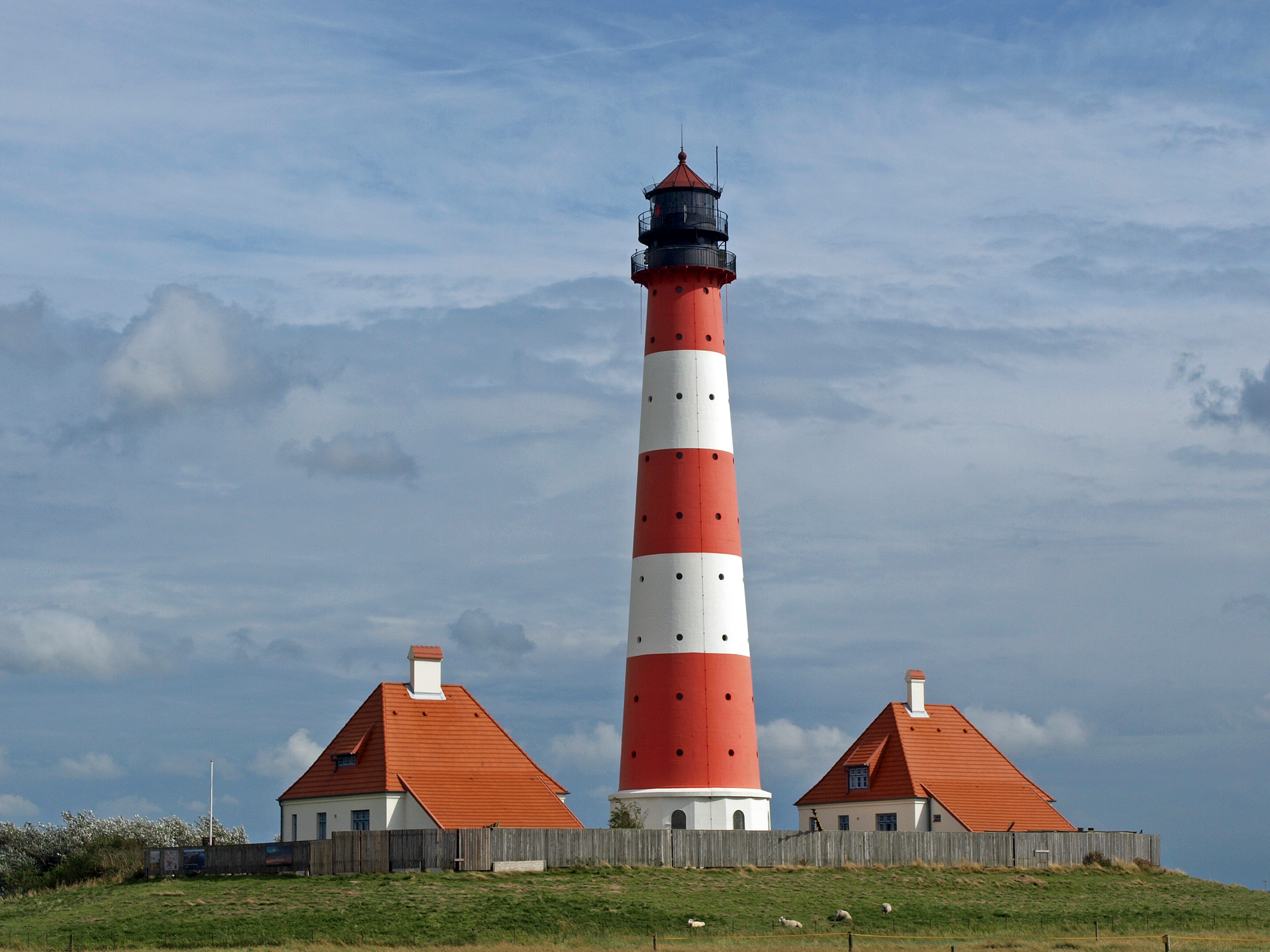 Leuchtturm in Westerheversand in Betrieb seit 1908